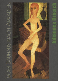 Johannes Driesch Mädchenakt um 1921 Katalog: Johannes Driesch Vom Bauhaus nach Arkadien, Weimar, Erfurt 2001